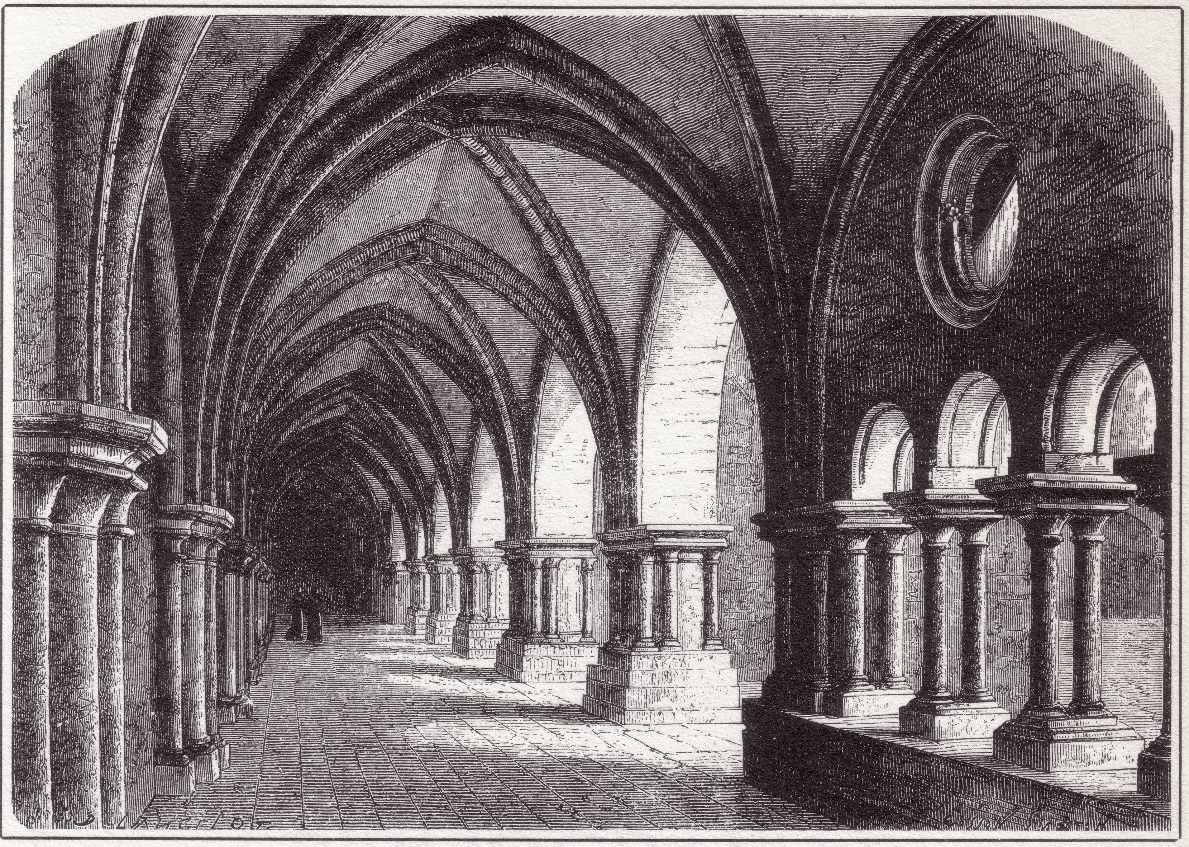 Gravure représentant l'aile septentrionale du cloître de Luexeuil.